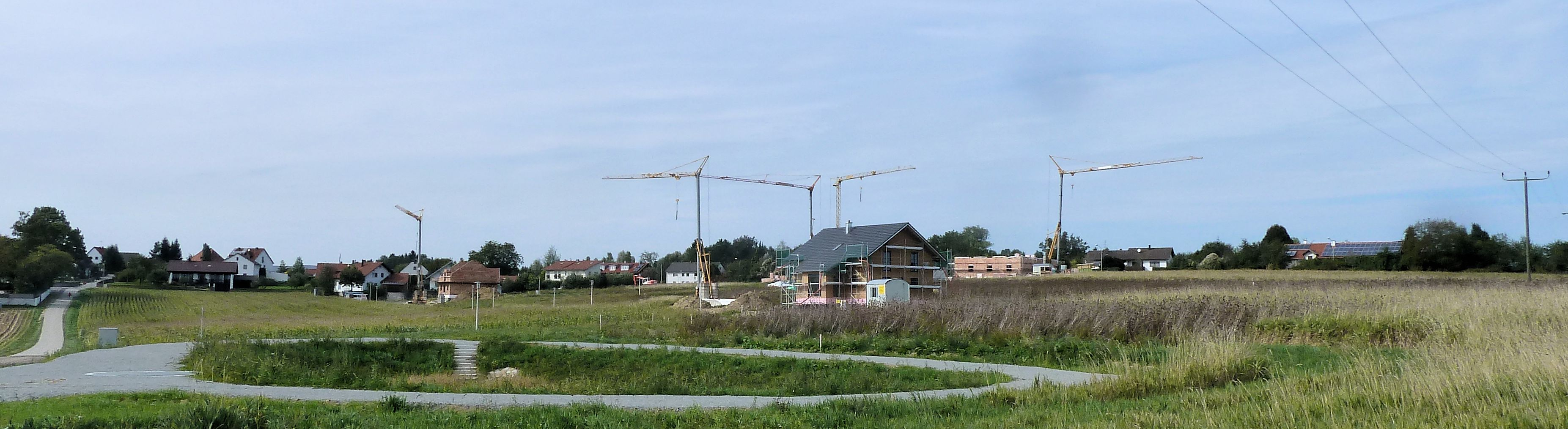 Baugebiet Adlkofen Nord I Teilabschnitt 1 - Bebauung zum 29.09.2013